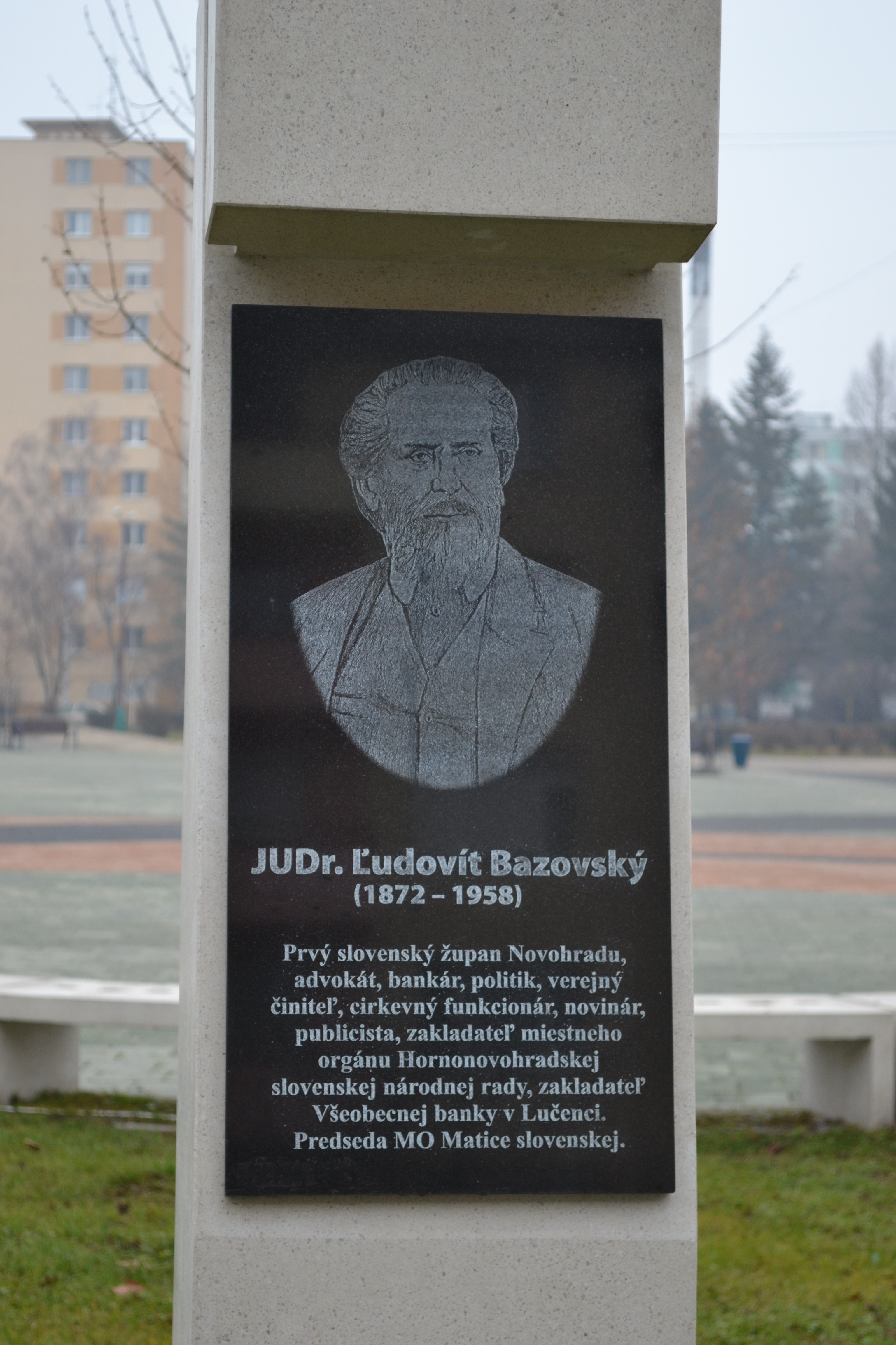 Spomienková tabuľa venovaná JUDr. Ľudovítovi Bazovskému pri chodníku osobností Novohradu na nám. Republiky v Lučenci.